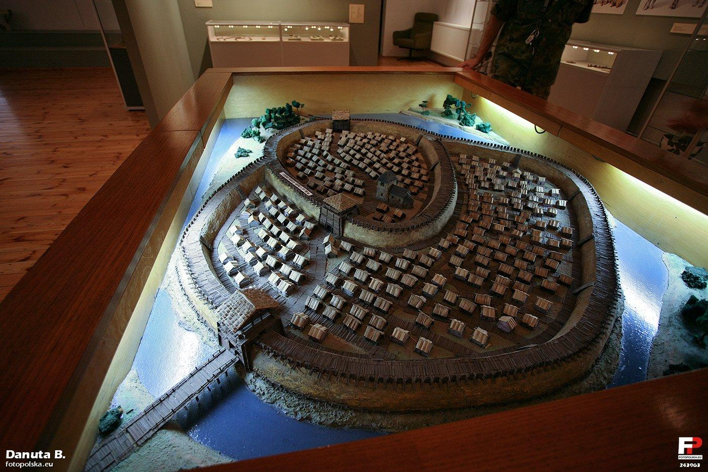 Profesjonalnie urządzone wnętrze muzeum. W gablocie model średniowiecznego grodziska, którego ślady znajdują się po drugiej stronie Warty..